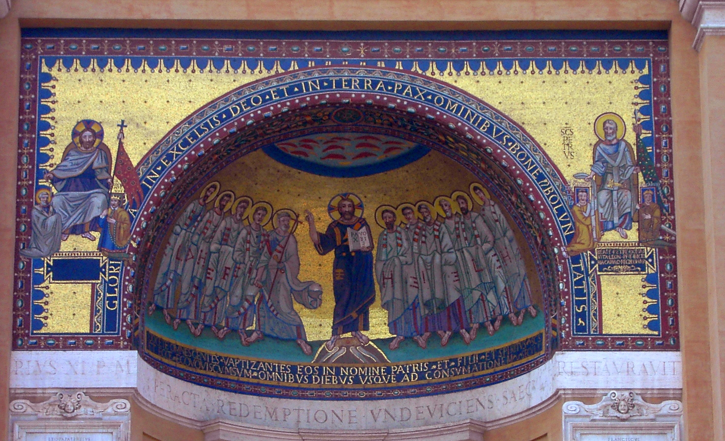 Mosaiken des Tricliniums beim Lateran.